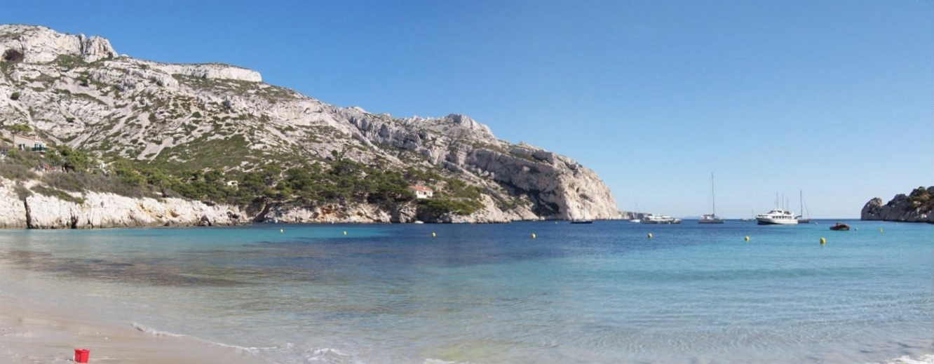 Calanque Sormiou